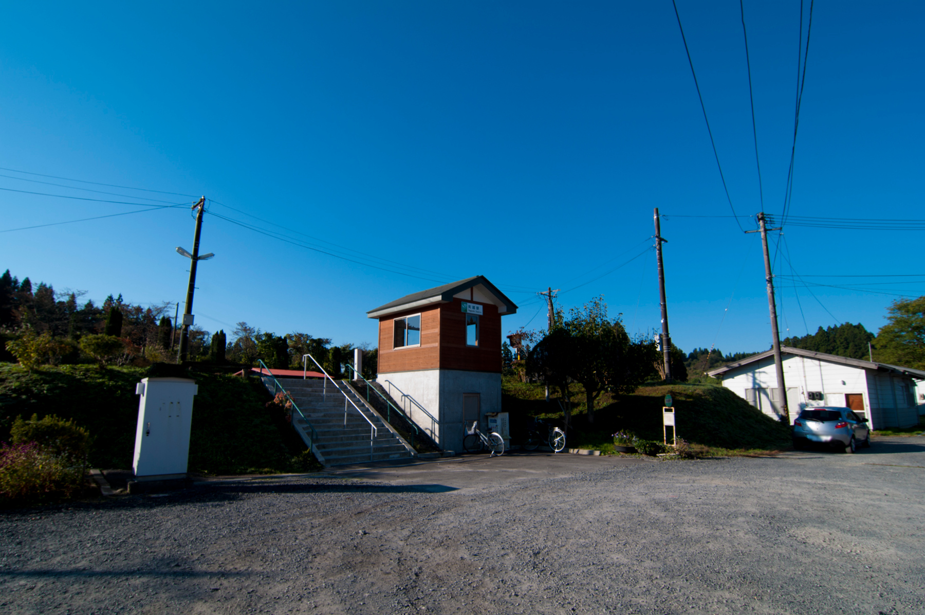 東日本旅客鉄道大船渡線矢越駅